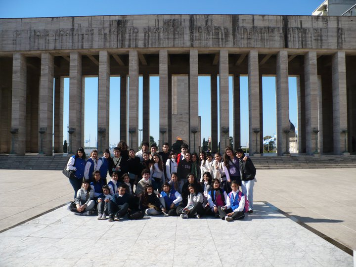 Viaje al arteBA 3er año del polimodal de la Escuela de Bellas Artes UNT 2011